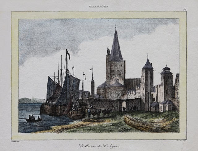 L'église de Saint-Martin à Cologne en Allemagne,par Augustin François Lemaître (1797-1870)